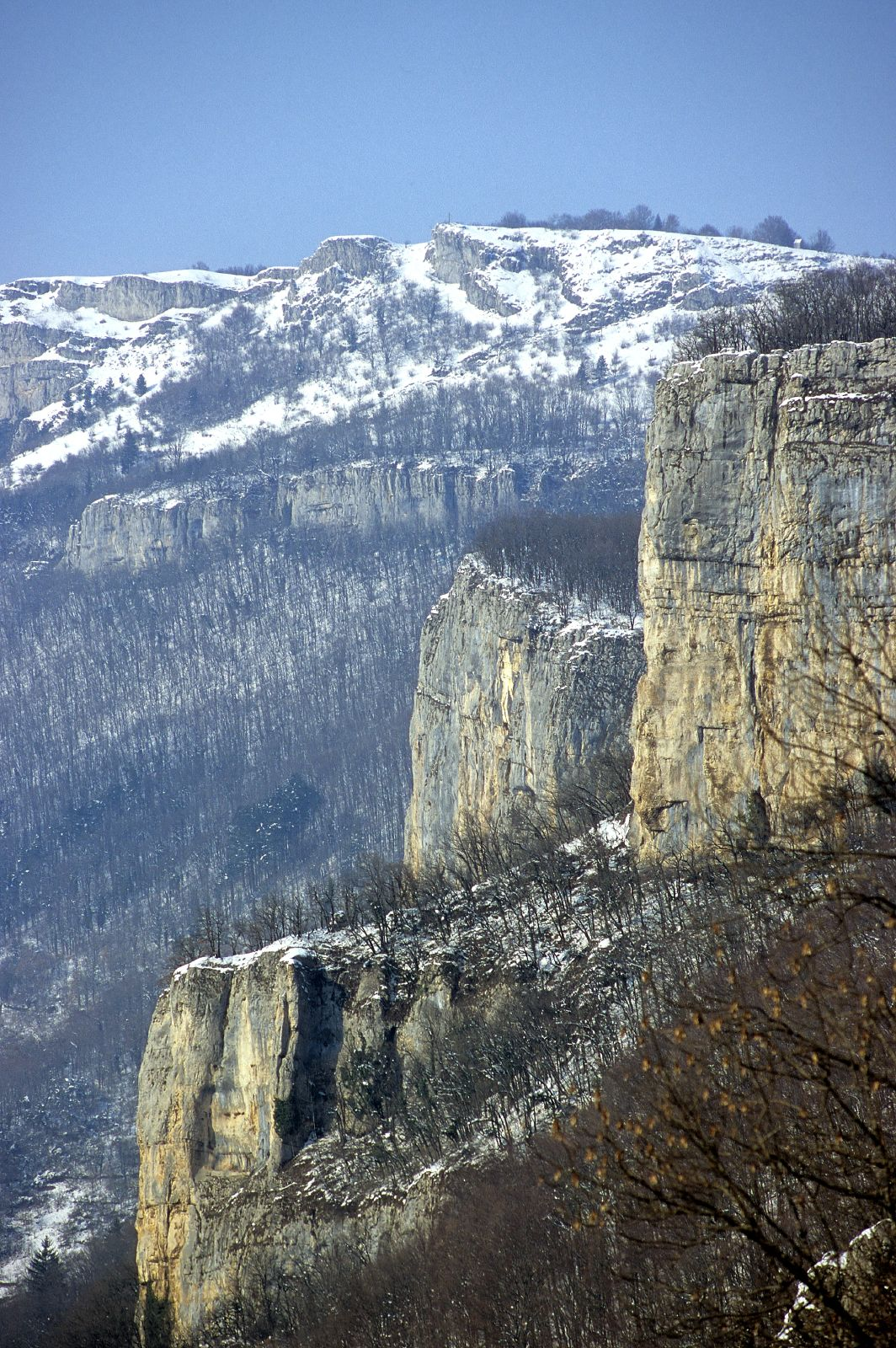 montagnes dominant les gorges de la Loue en hiver